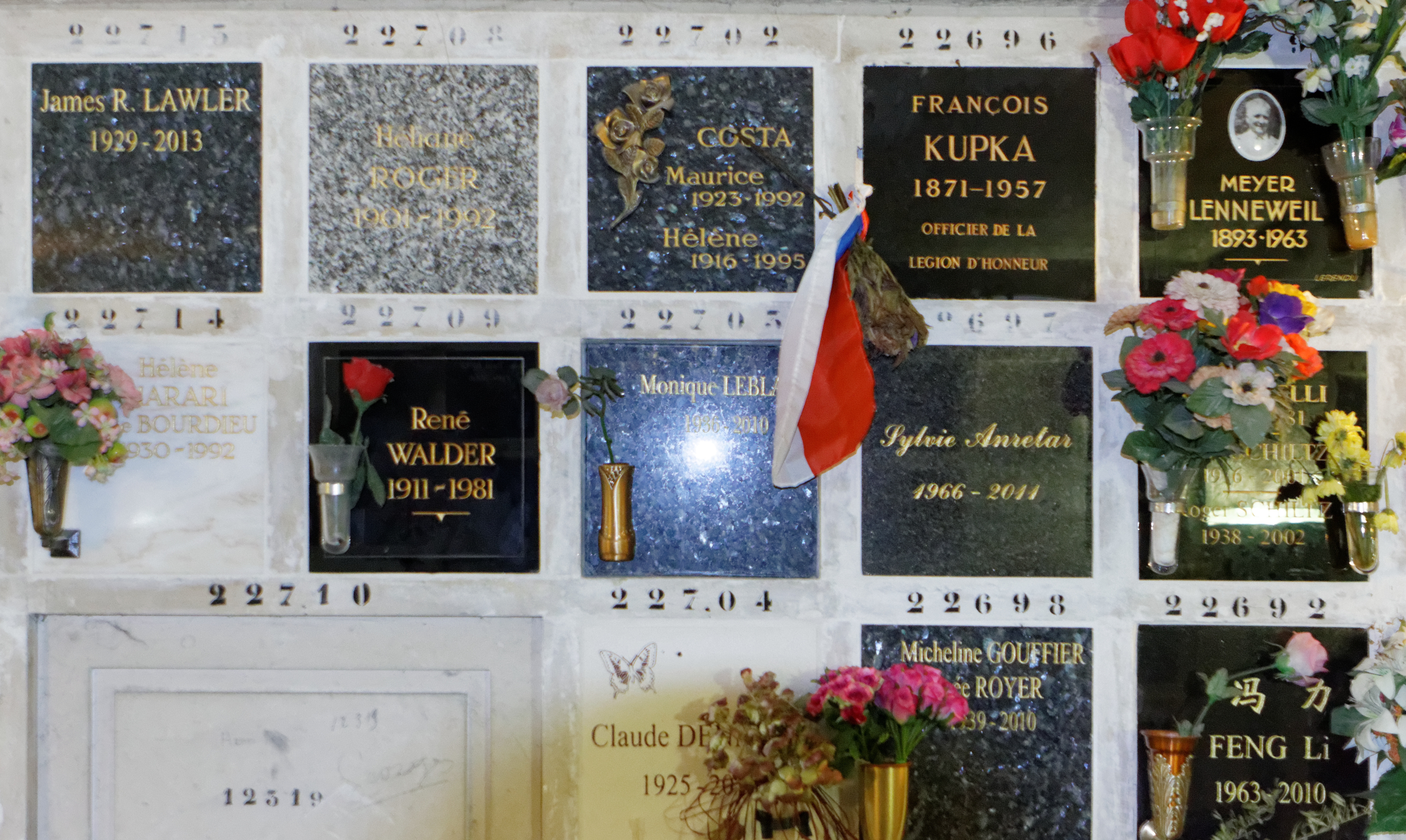 Cases du columbarium du cimetière du Père-Lachaise.